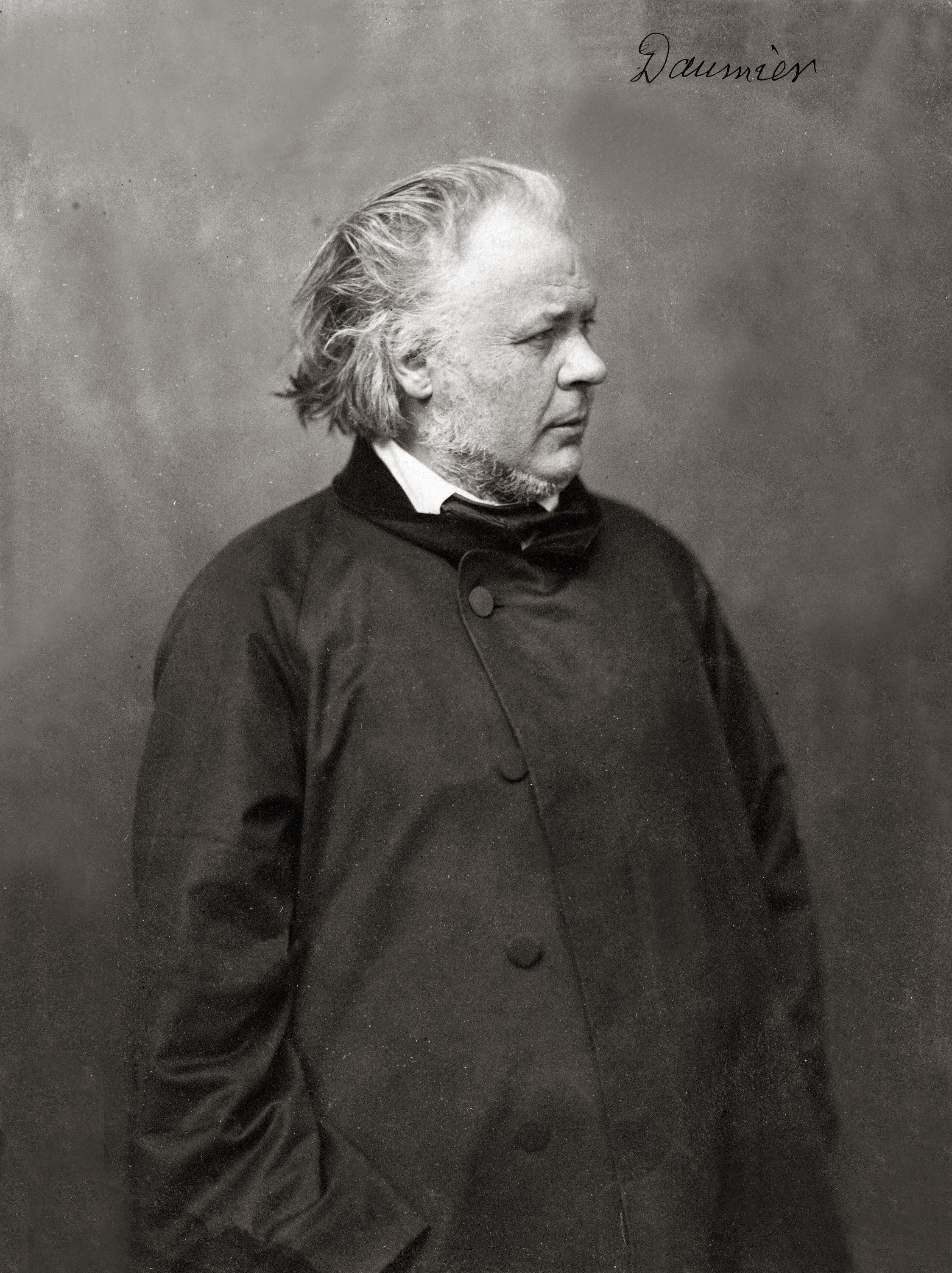 Honoré Daumier, portrait by Nadar (d. 1910), from Image:Honoré Daumier.jpg